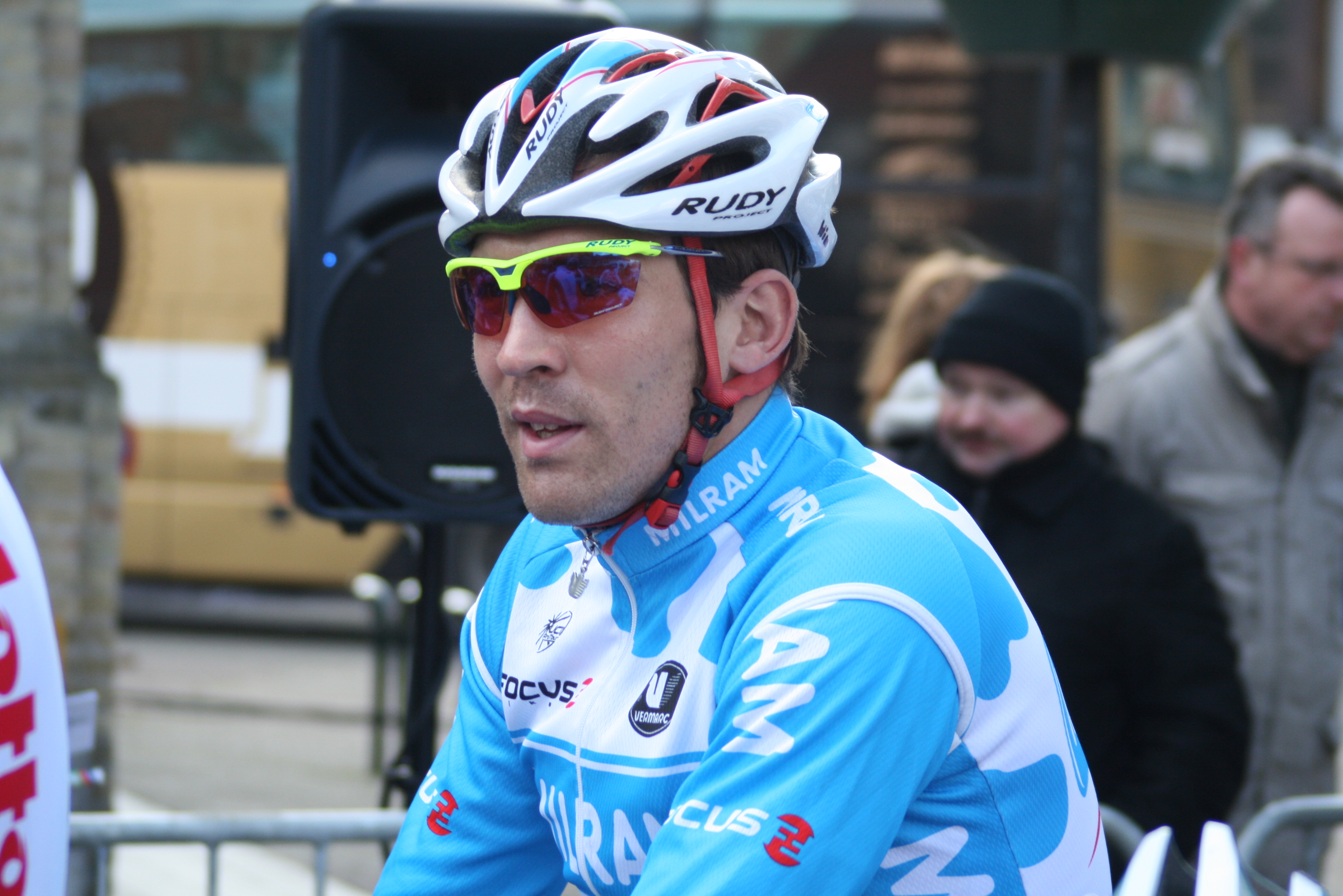 Wim de Vocht au mont Kemmel pendant les Trois jours de Flandre occidentale